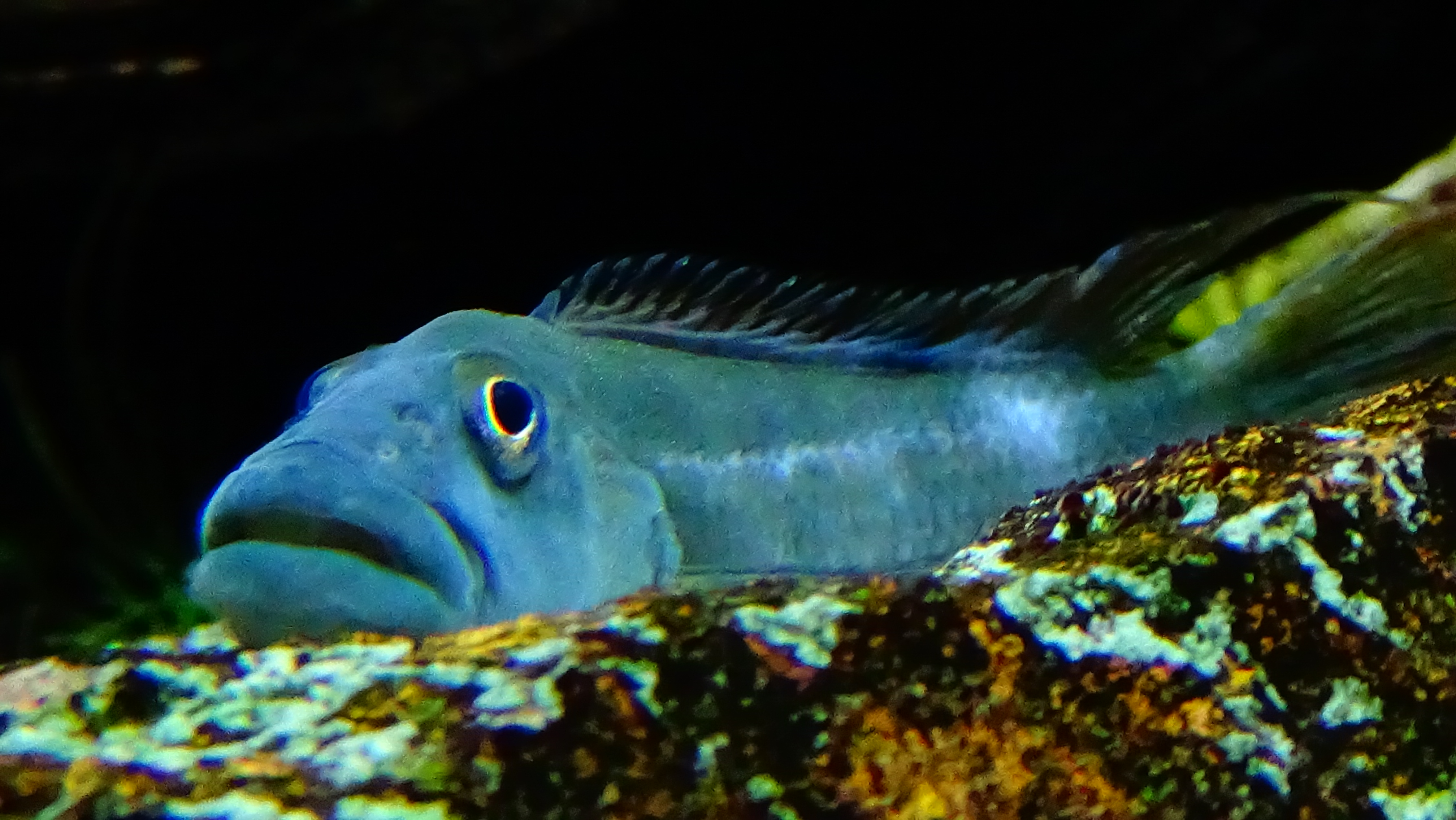 Steatocranus tinanti - Aquarium Tropical du Palais de la Porte Dorée Paris, ile de France, France - 12/2014